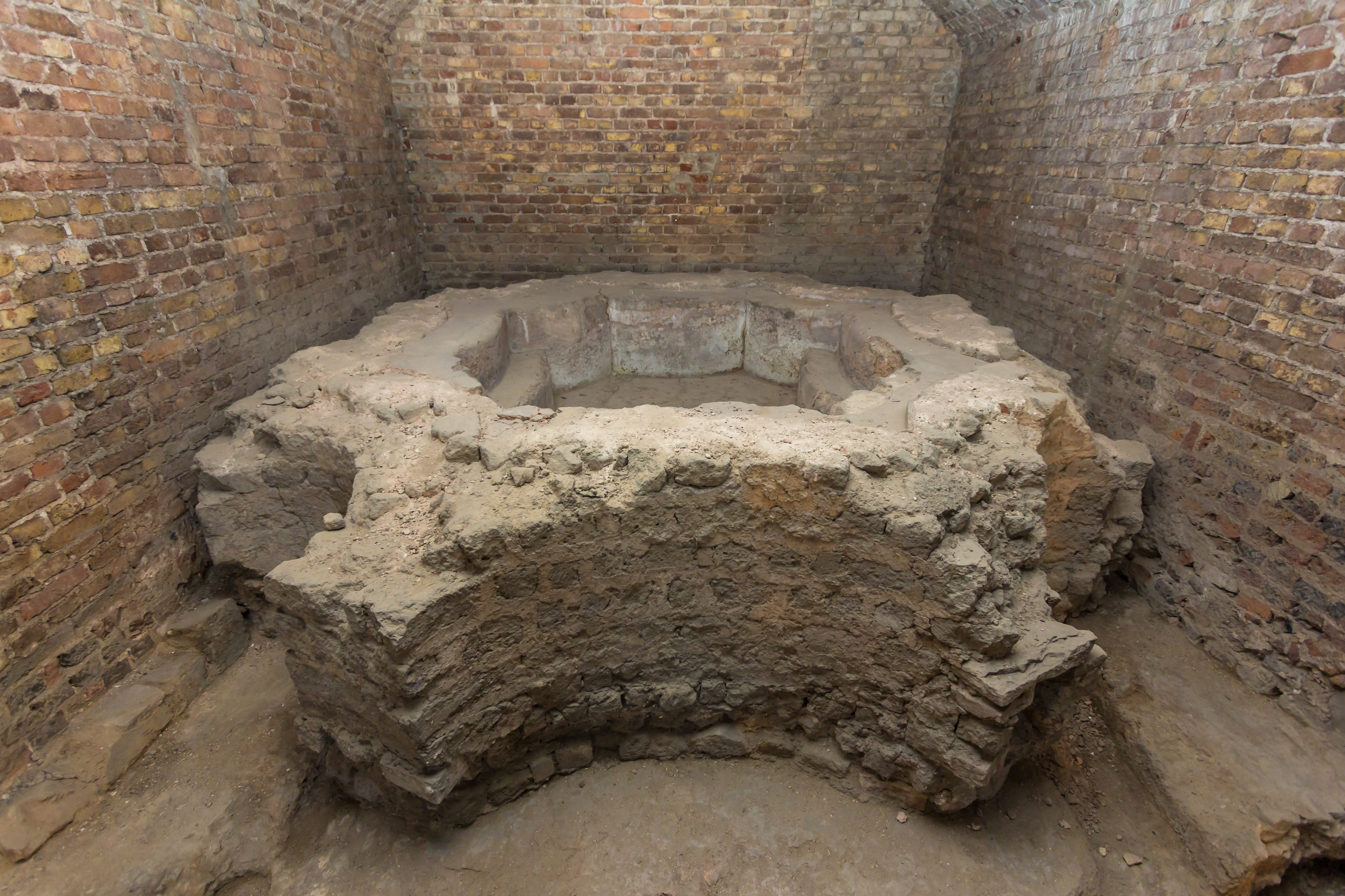 Übergabe Rohbau Baptisterium Kölner Dom